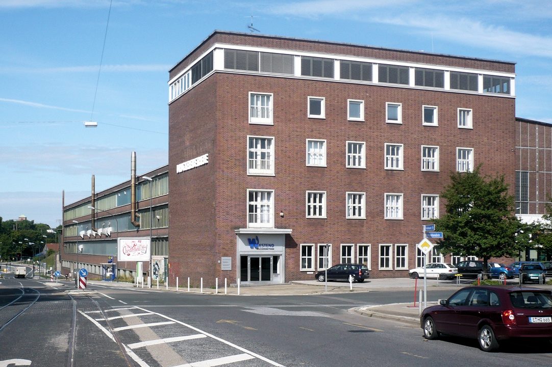 Westend Essen